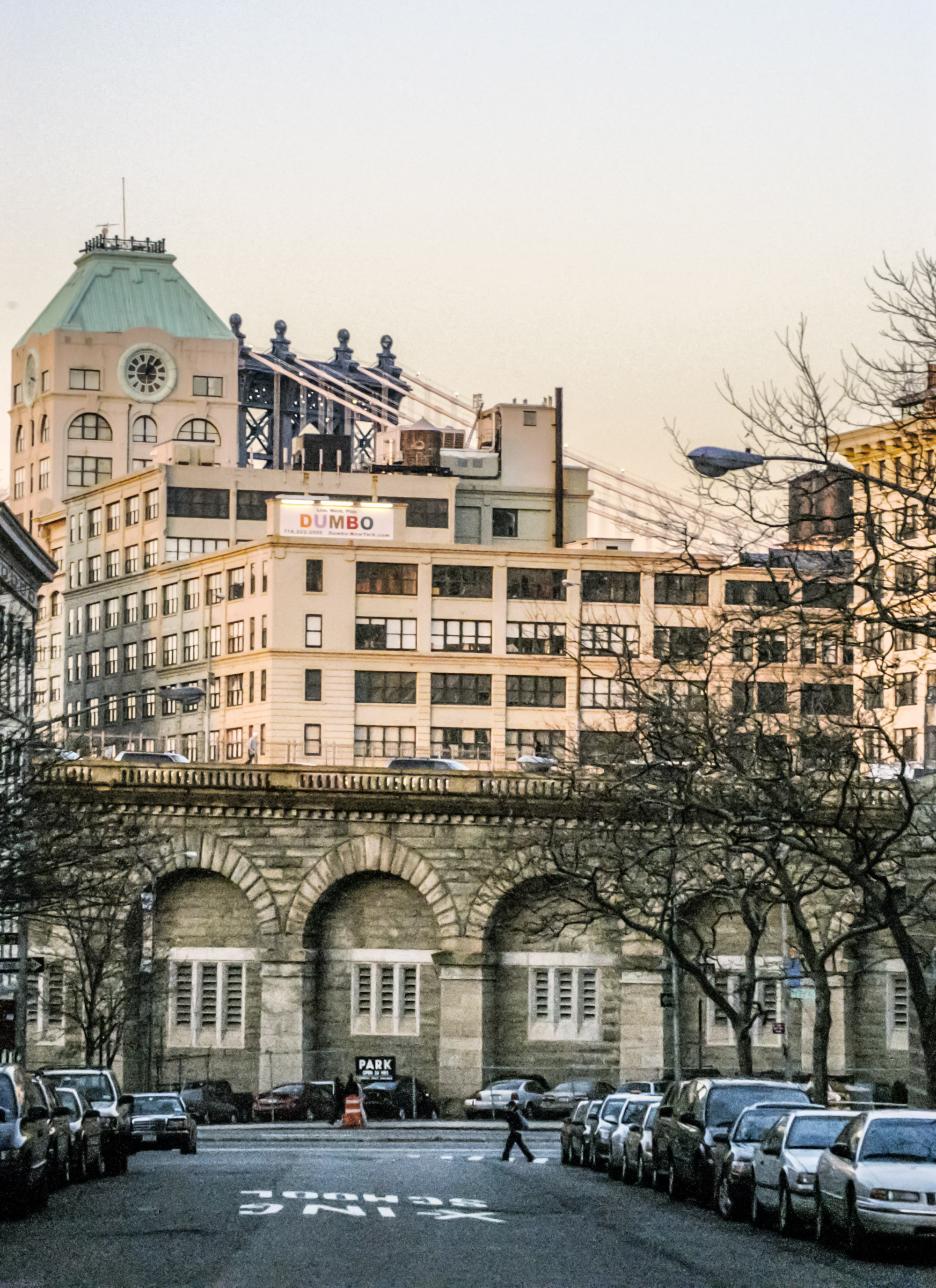 DUMBO